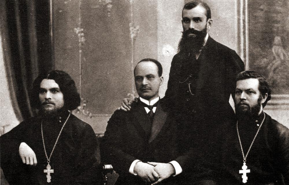 Священномученик Максим Горлицкий и его соратники